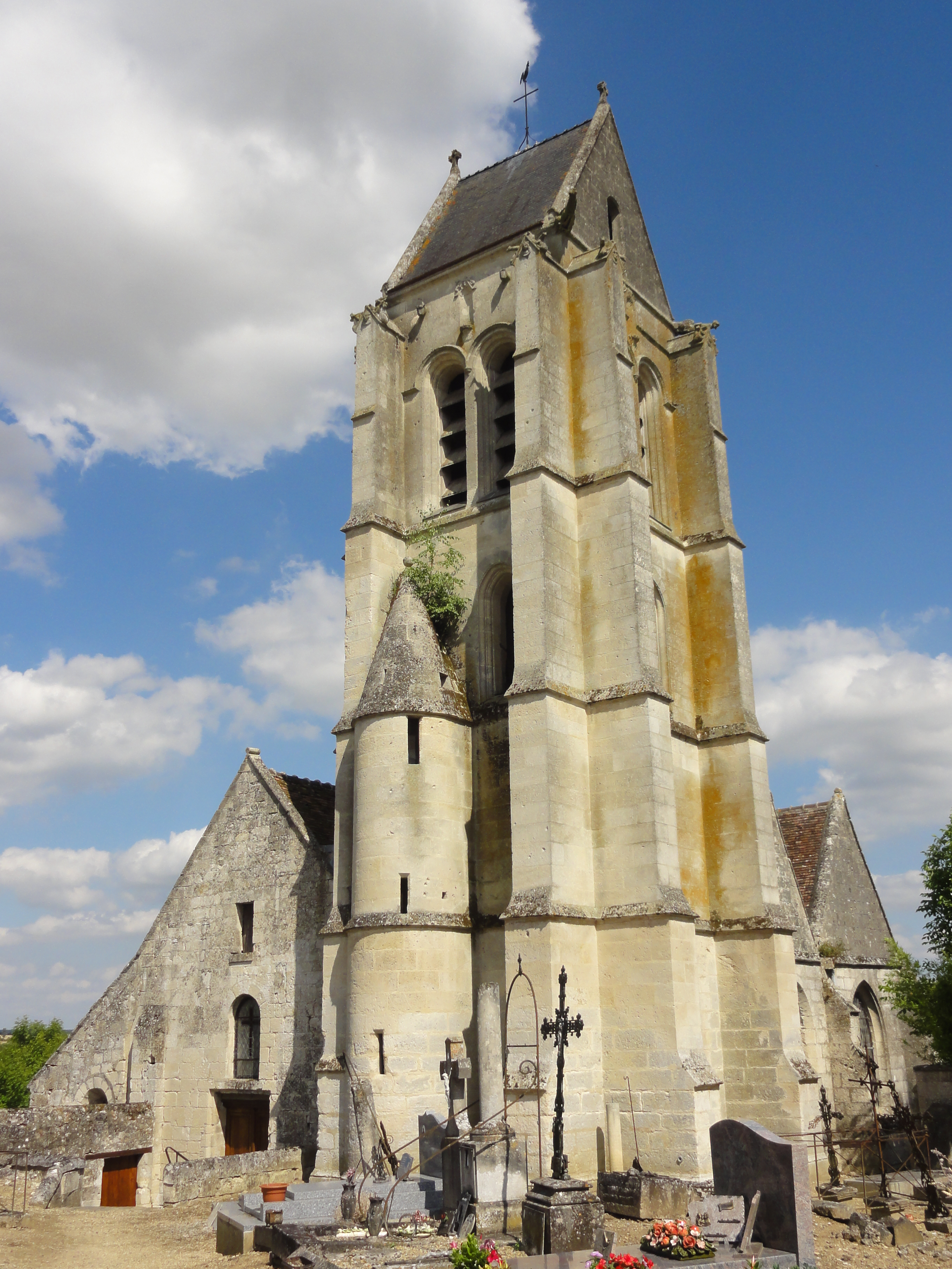 Église Saint-Laurent de Russy-Bémont (voir titre).